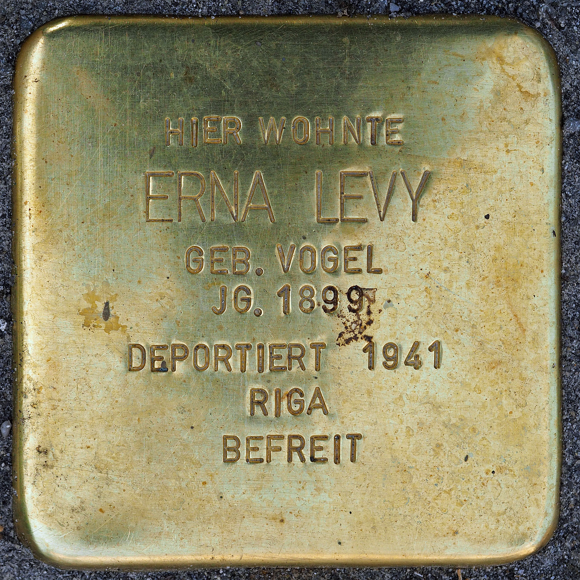 Stolpersteine Schwalmtal: Erna Levy